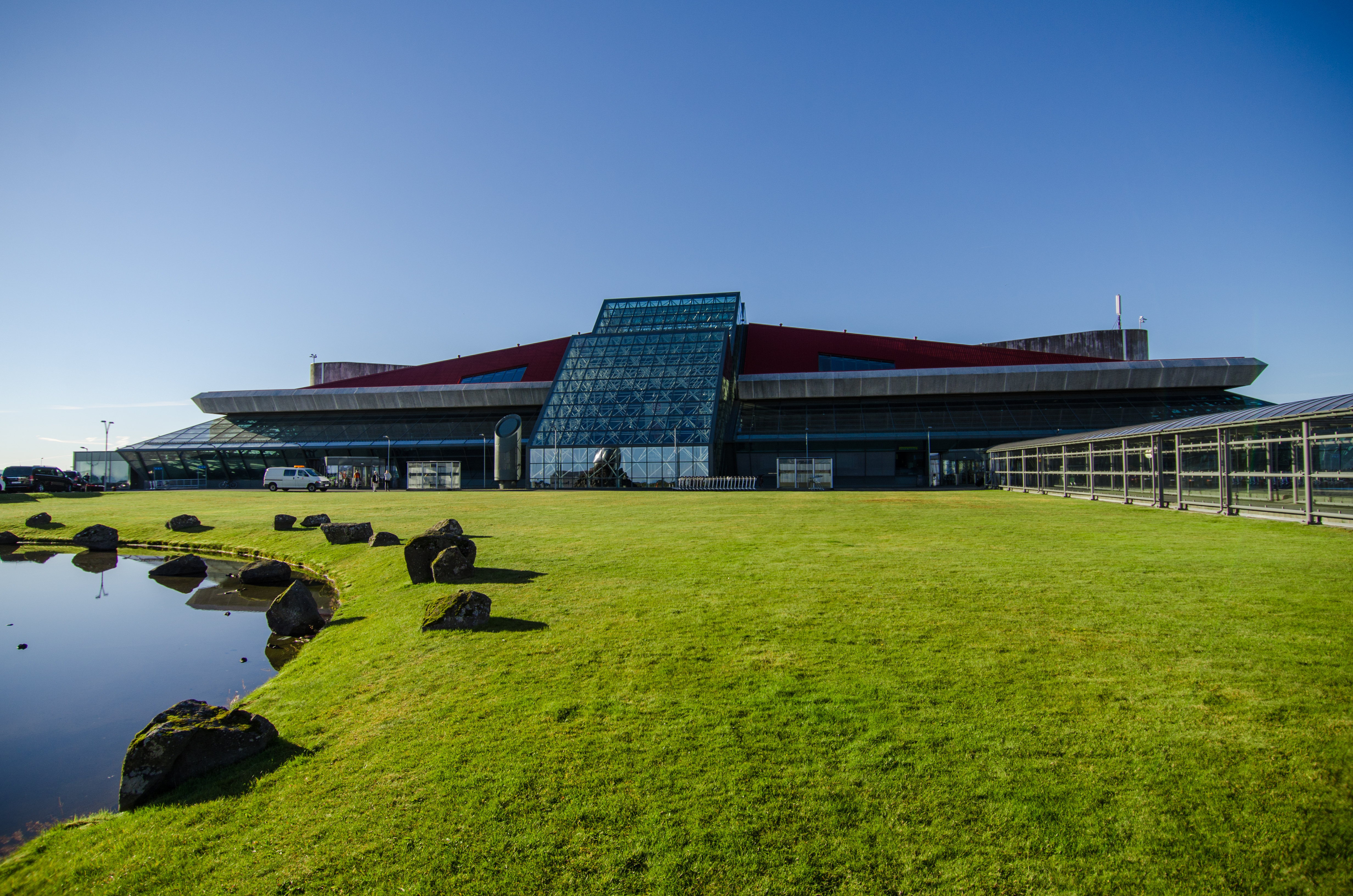 Seen in Sense8 episodes #107 & #112.